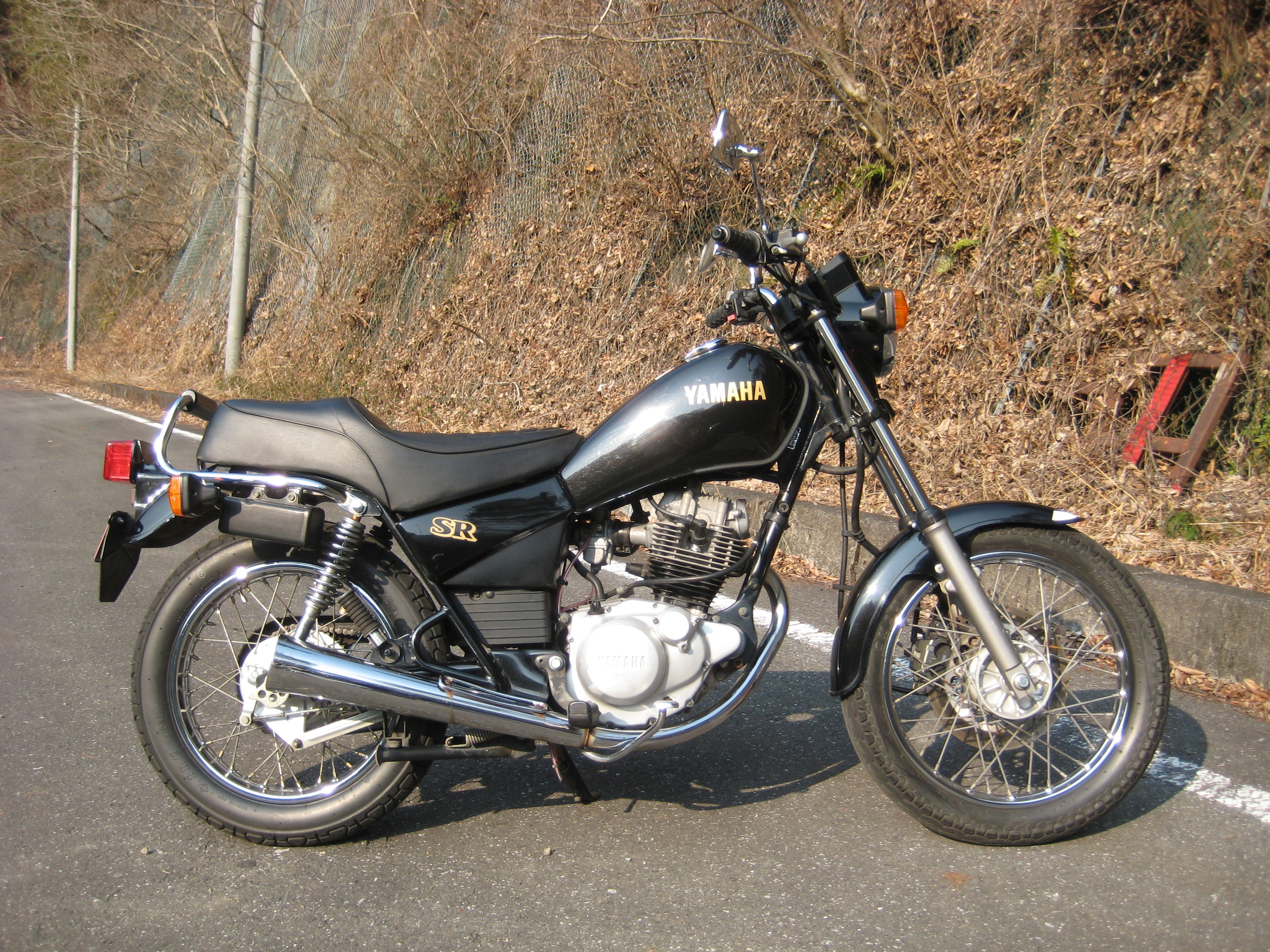 Yamaha SR125 1997